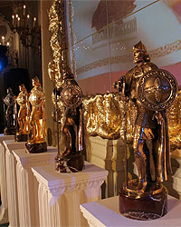 Фотография статуэток - главных призов Всероссийской историко-литературной премии "Александр Невский": скульптурное изображение Святого Благоверного князя Александра Невского работы скульптора Э.Мхояна